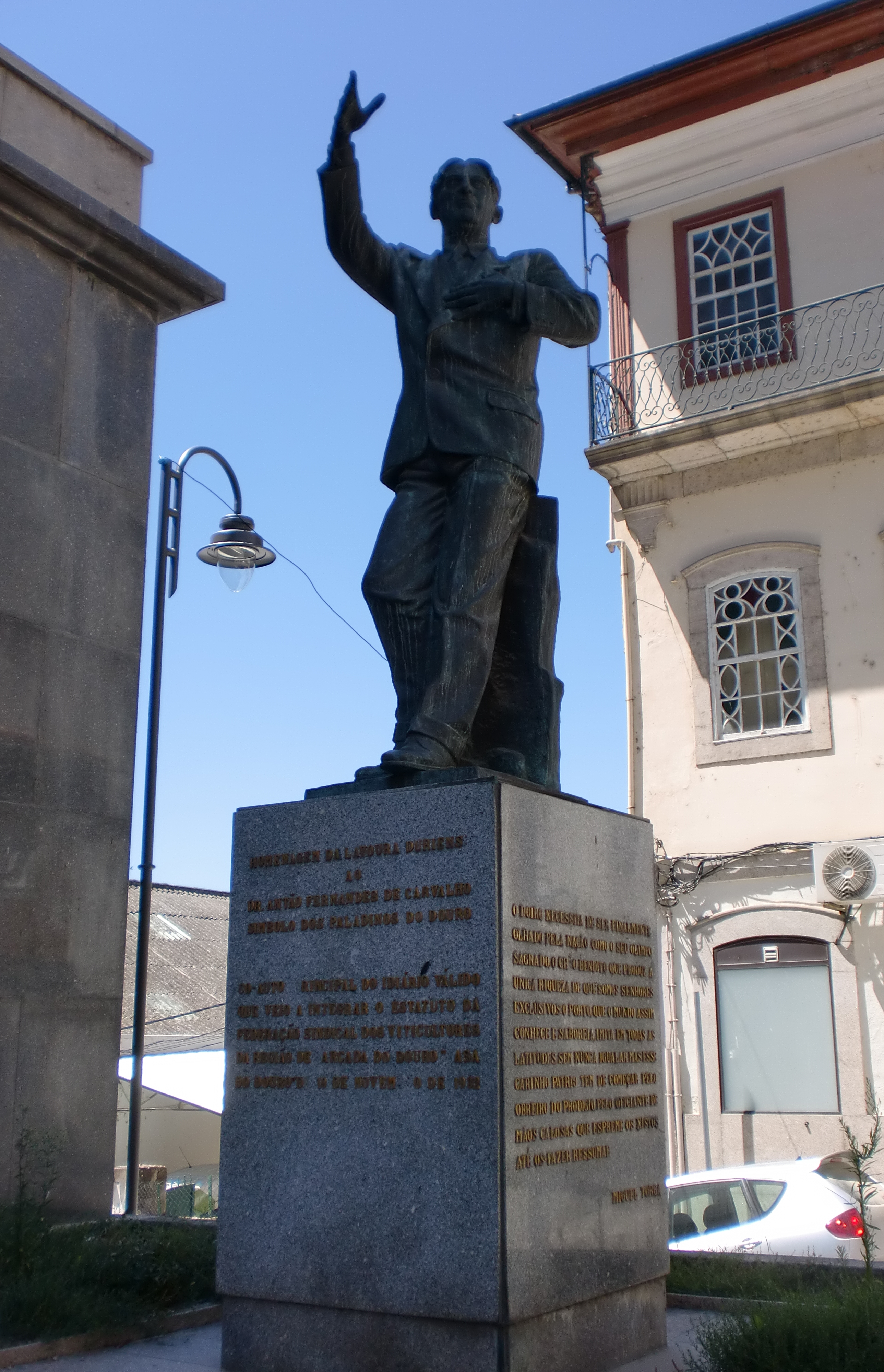 Estátua de Antão Fernandes de Carvalho, em frente à Casa do Douro.